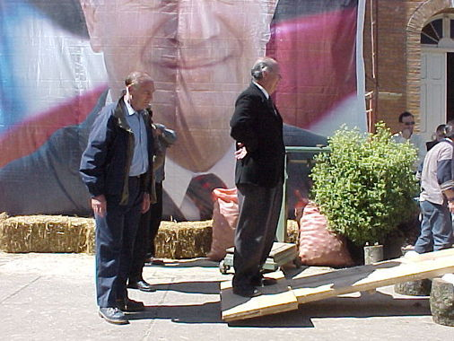 Gira con Ricardo Lagos durante su campaña política a la X región.